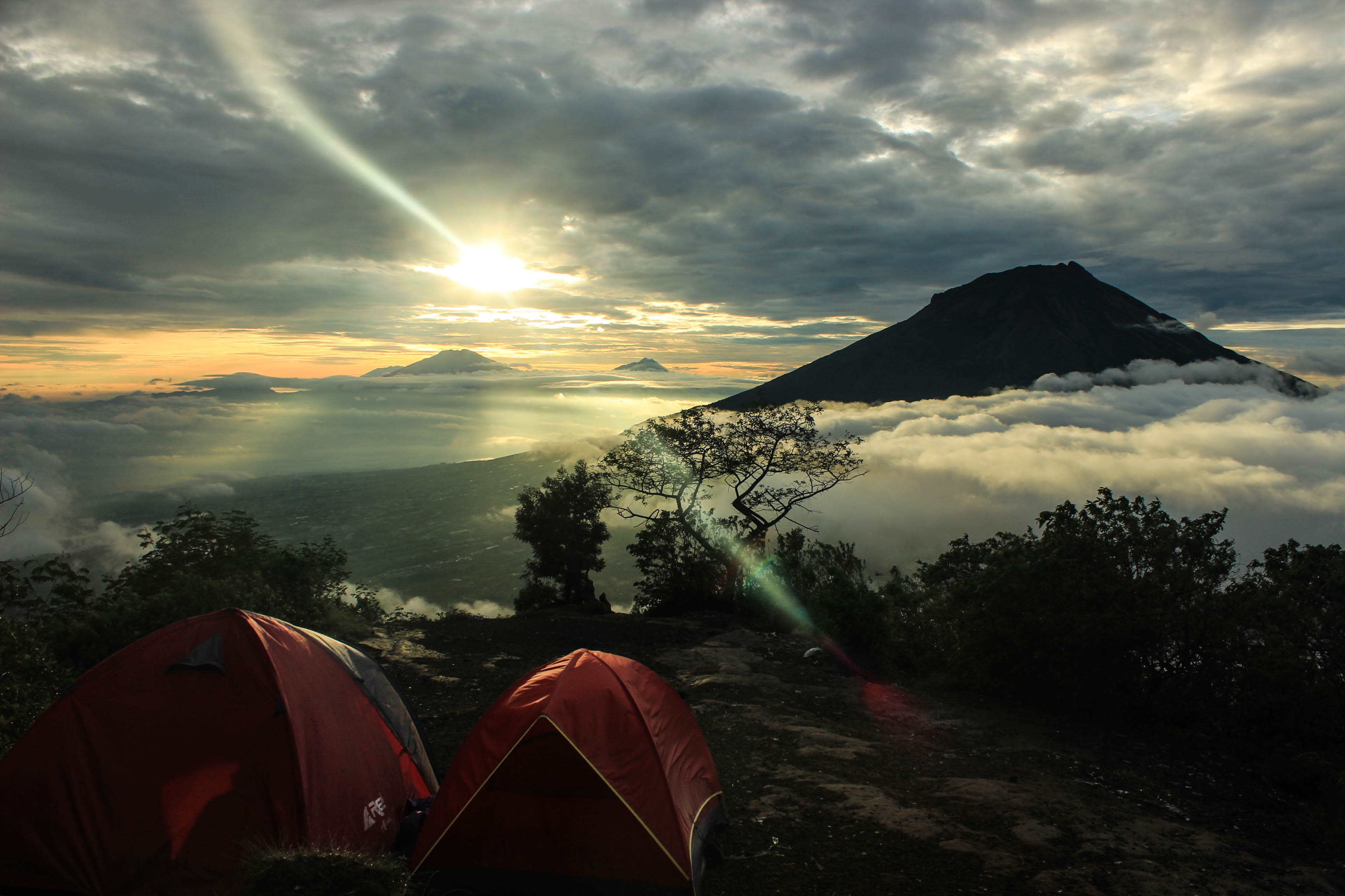 Tenda pendaki gunung Sindoro ditinggalkan penghuninya yang sedang 'Attack summit', sementara matahari pagi masih tertutup awan musim hujan di akhir bulan Januari.